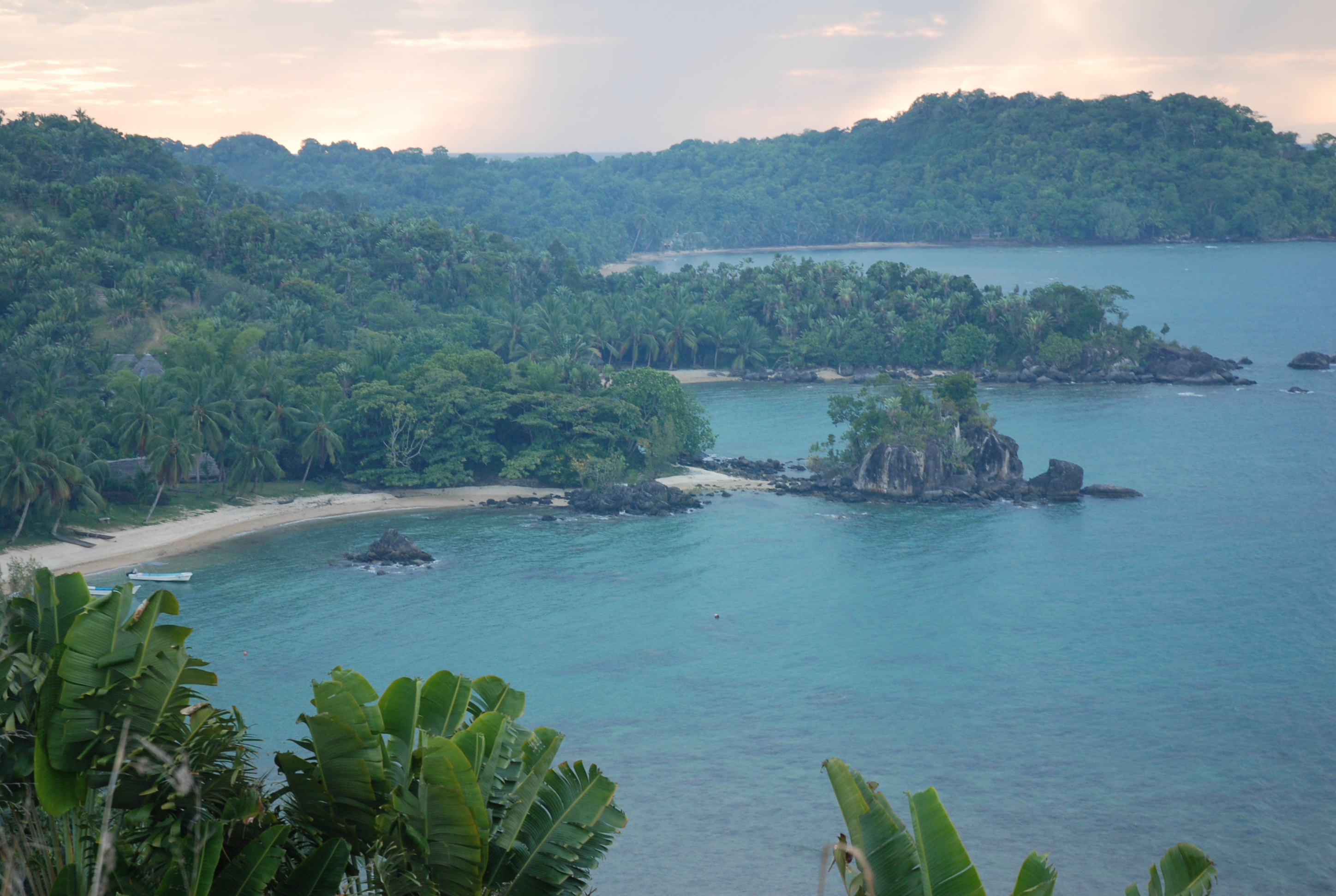 Strand auf Sainte Marie